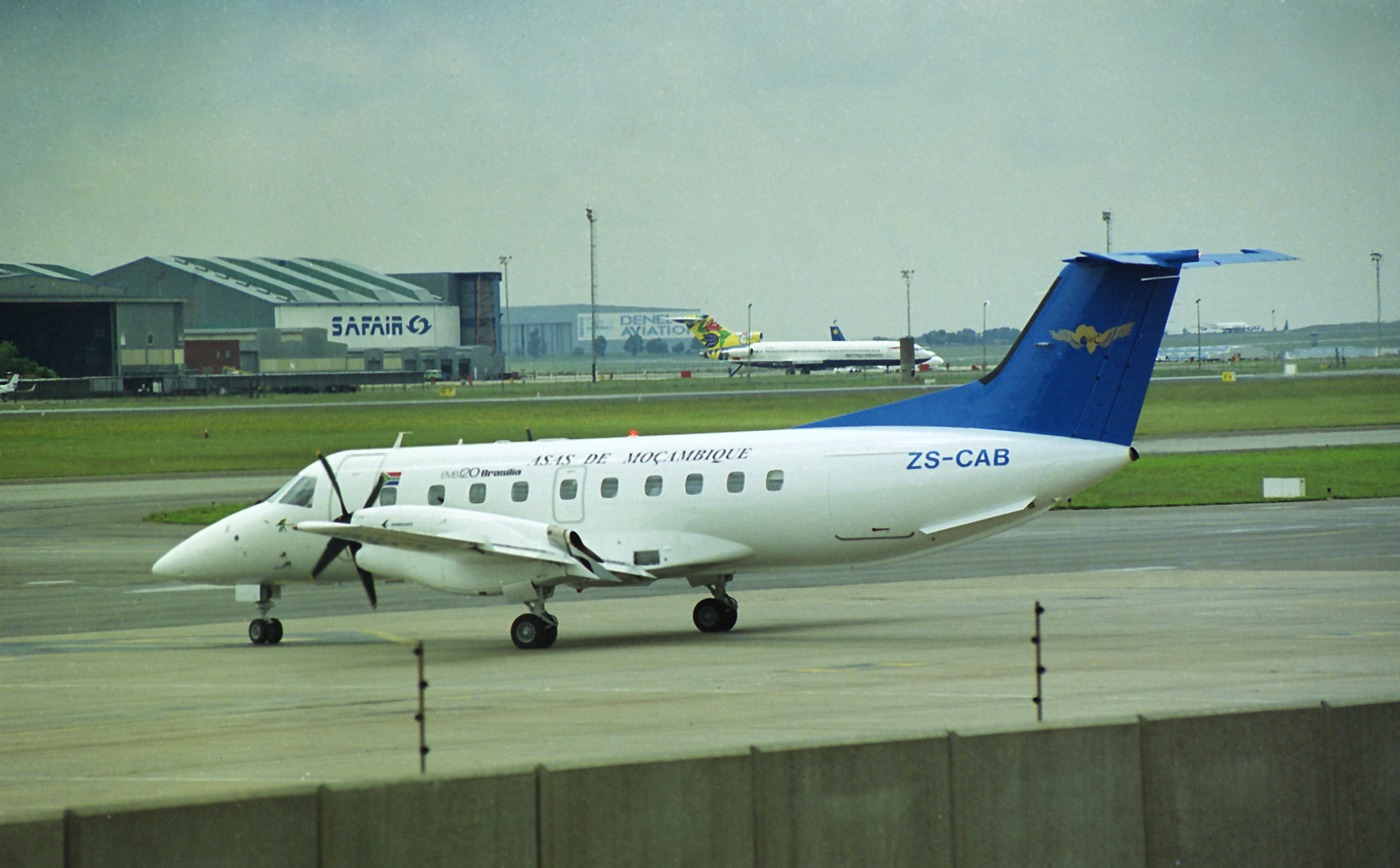 Asas De Mocambique EMB120 ZS-CAB